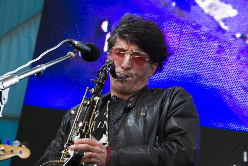 Willy Crook - "Spinetta y el lenguaje del cielo”, en Tecnópolis (2014).